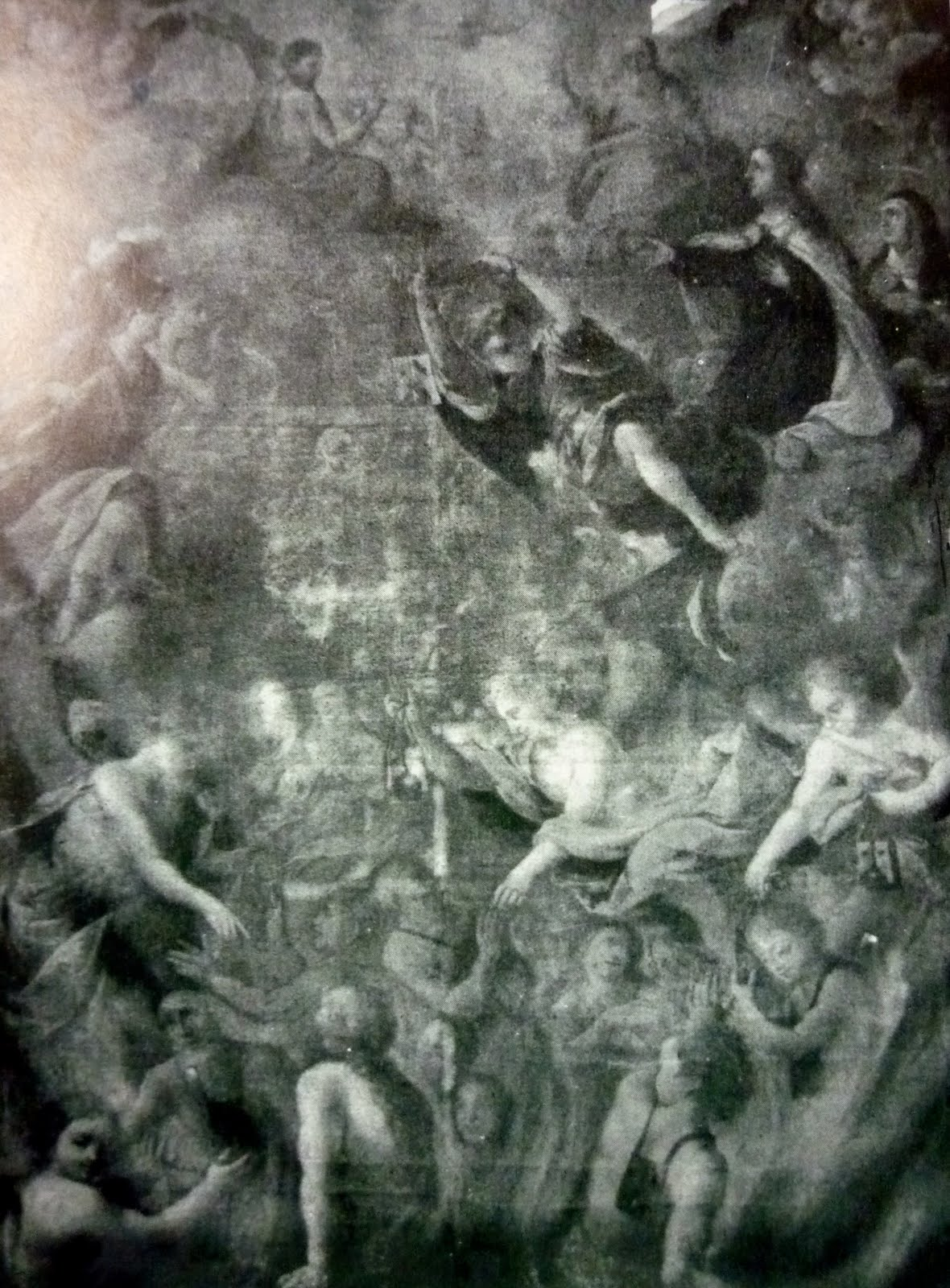 La Virgen del Carmen intercediendo por las ánimas del Purgatorio, óleo sobre lienzo, capilla de las Ánimas, iglesia del Carmen, Corella, Navarra